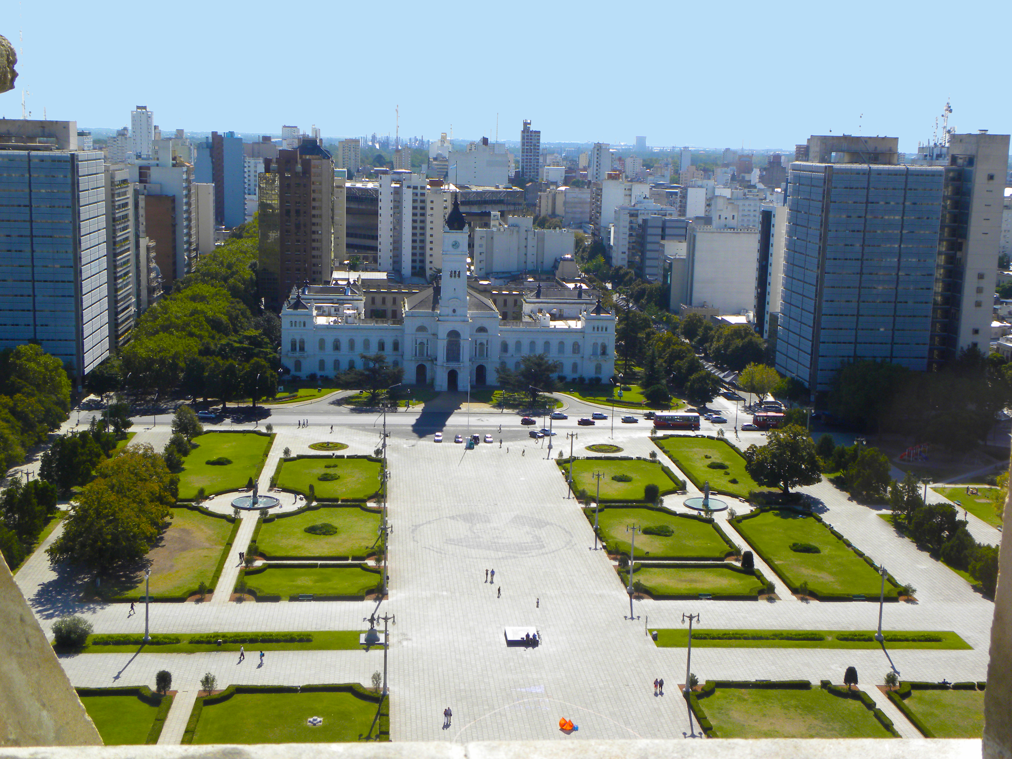 Plaza Mariano Moreno, casco urbano fundacional de la Ciudad de La Plata